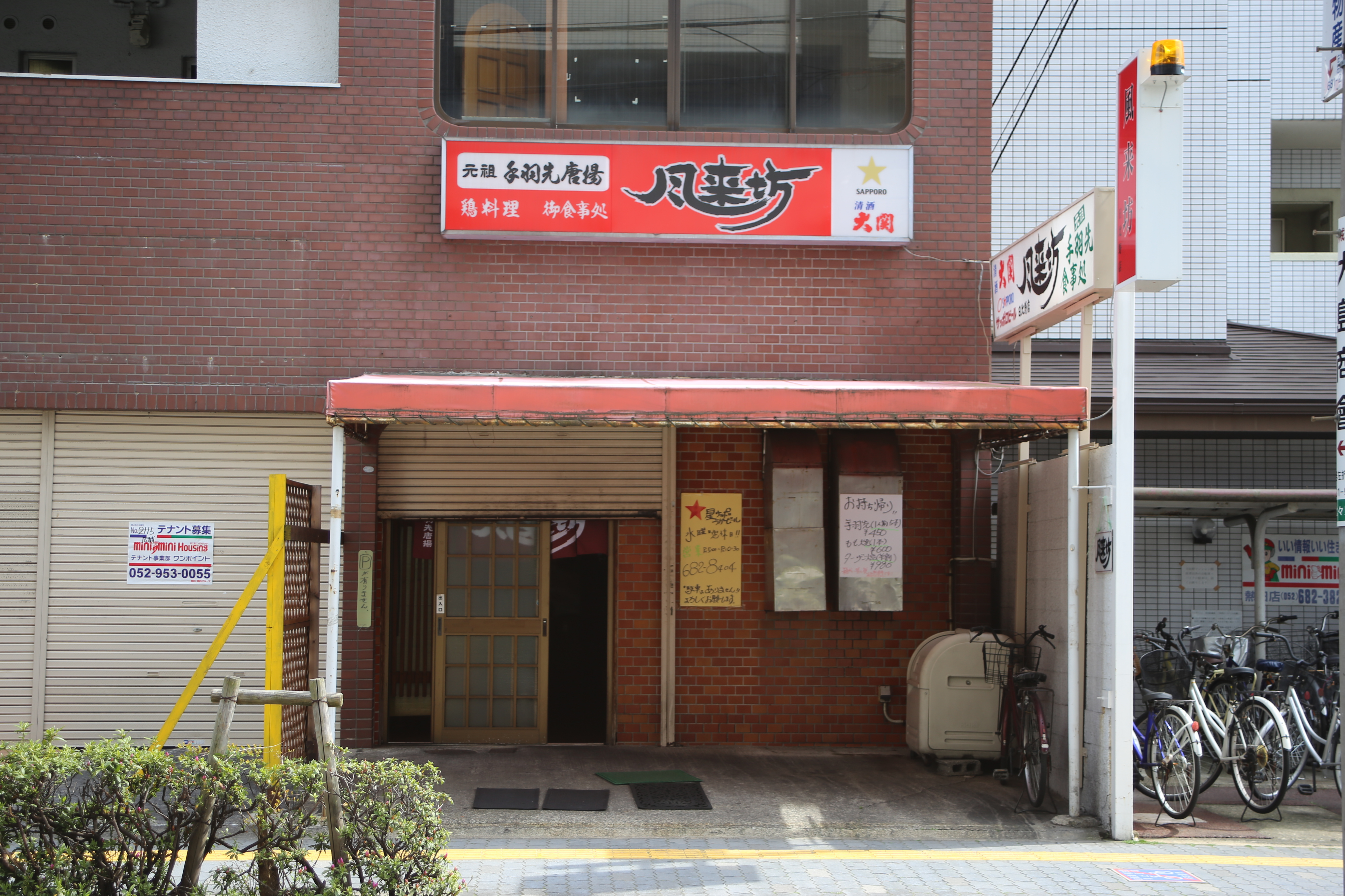 名古屋市熱田区比々野町の風来坊日比野店